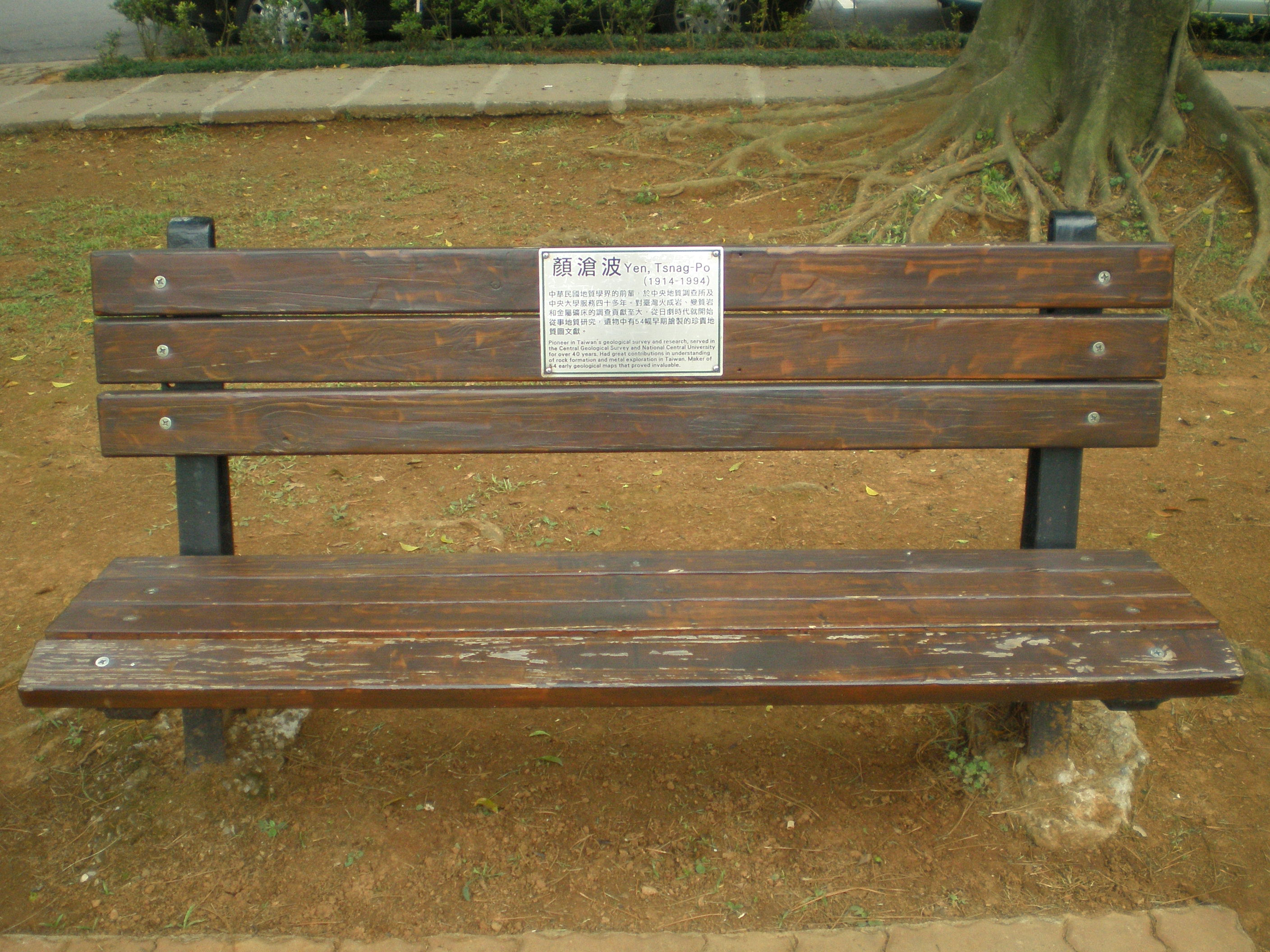 在國立中央大學內介紹地質學家顏滄波的座椅